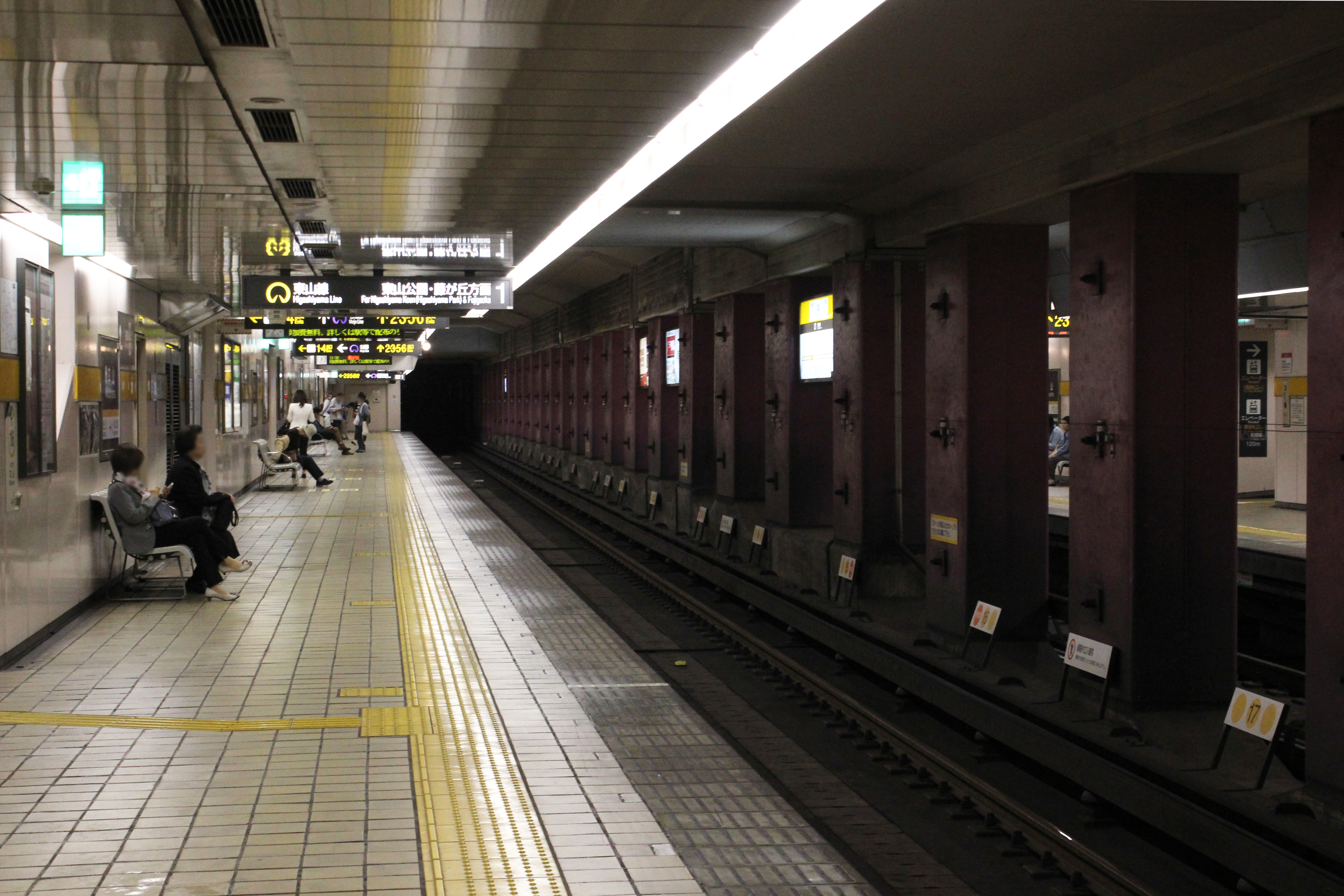 名古屋市営地下鉄東山線本山駅